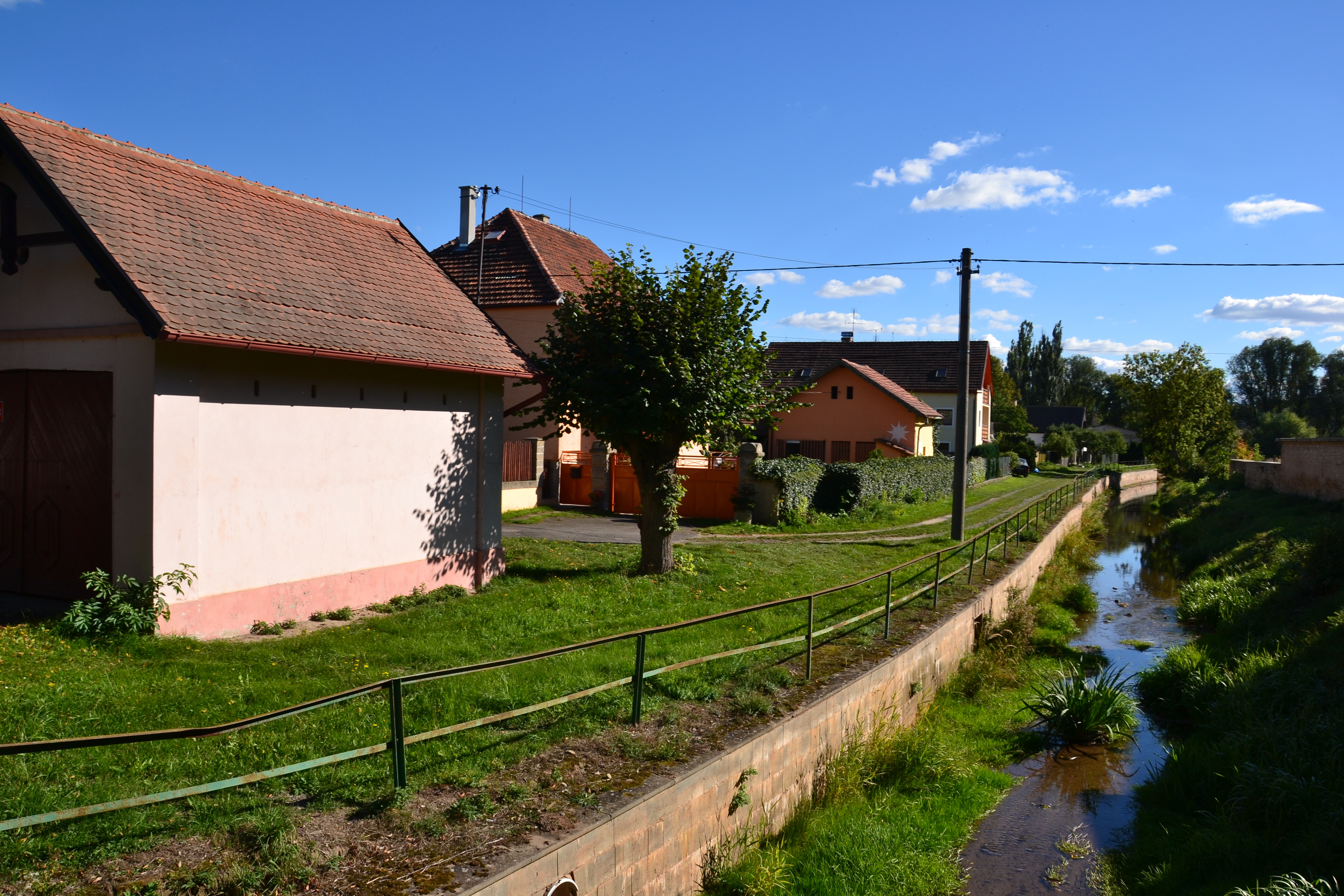 Kolešovický potok pod návsí